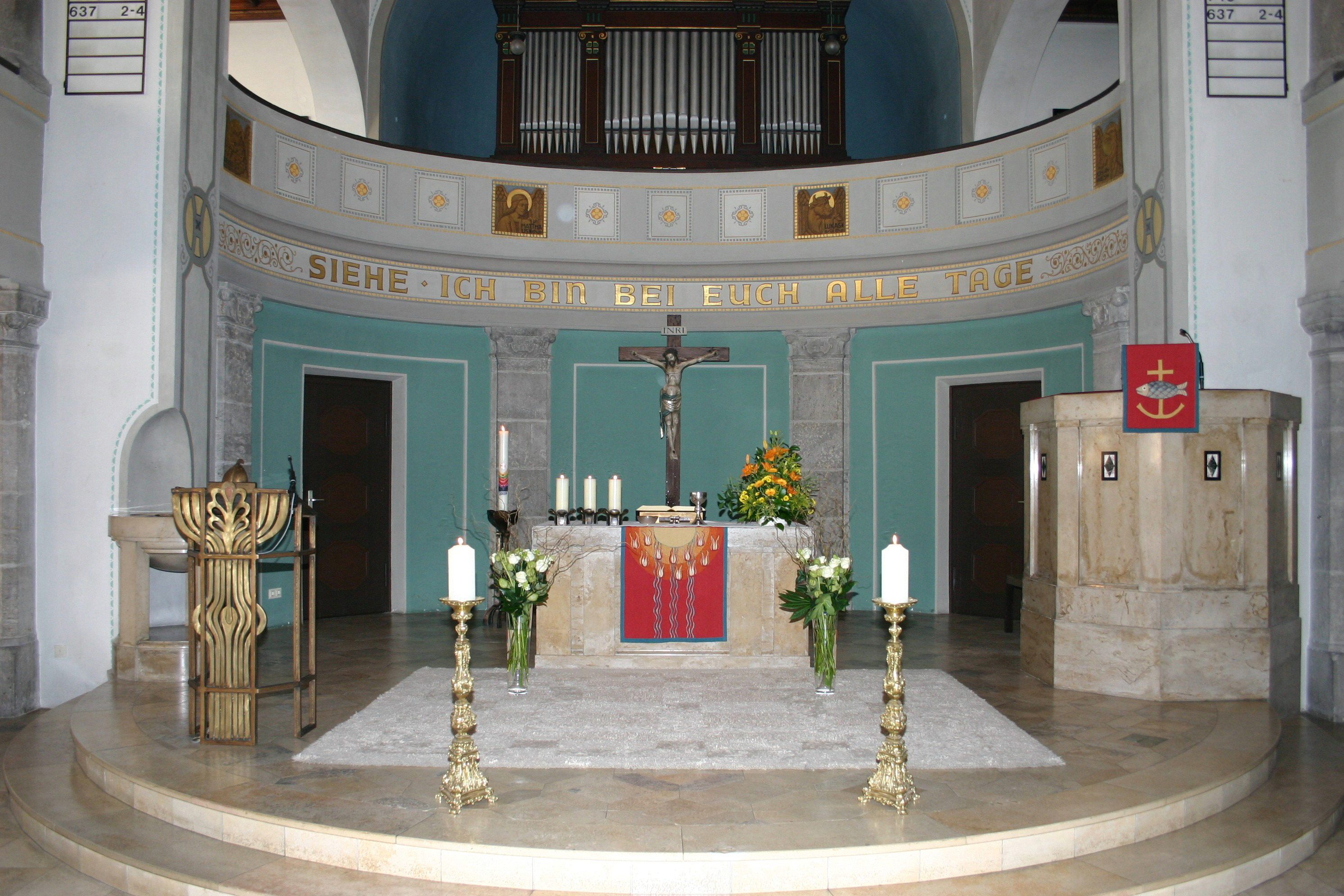 Altarraum der evangelischen Kirche St. Paul in Nürnberg